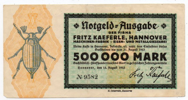 500.000 Mark Notgeld aus der Zeit der Deutschen Hyperinflation, hier datiert auf den 15. August 1923, auszahlbar zum 31. August des selben Jahres" im Gebäude der "Kasse in der Jakobistraße 53 , Faksimile-Signatur von Fritz Kaeferle, Inhaber der Firma Fritz Kaeferle, Maschinen-Fabrik, Eisen- und Metallgiesserei. Am Fuß des Gutscheines findet sich der Hinweis auf die Druckerei Heinrich Osterwald, am linken Papierrand ist der Maikäfer als Fabrik-Zeichen des Unternehmens zu sehen ...